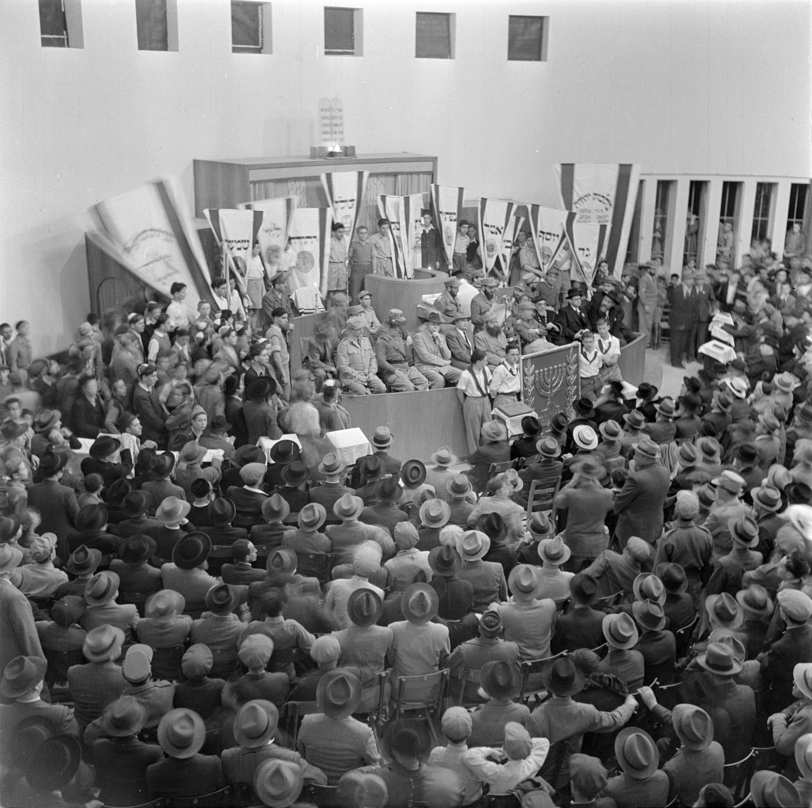 Collectie / Archief : Fotocollectie Van de Poll Reportage / Serie : Israël 1948-1949: Jeruzalem Beschrijving : Herdenking van de eerste verjaardag van Israels onafhankelijkheid in de Jessurun-synagoge Datum : 1949 Locatie : Israël, Jeruzalem Trefwoorden : herdenkingen, nationale feestdagen, publiek, synagoges, vlaggen Fotograaf : Poll, Willem van de Auteursrechthebbende : Nationaal Archief Materiaalsoort : Negatief (zwart/wit) Nummer archiefinventaris : bekijk toegang 2.24.14.02 Bestanddeelnummer : 255-0368